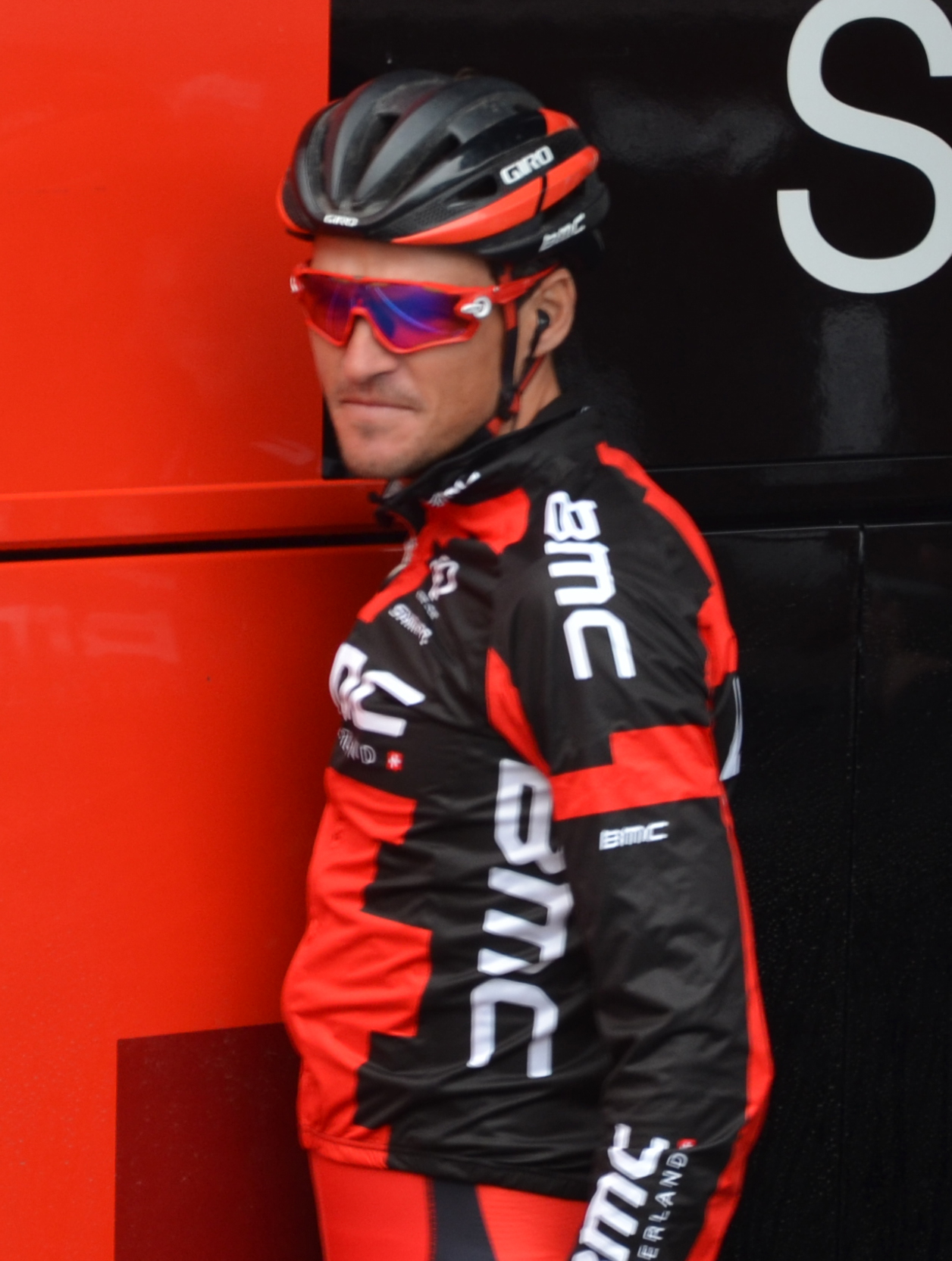 Greg Van Avermaet au départ de la 2e étape du Tour de France 2016.